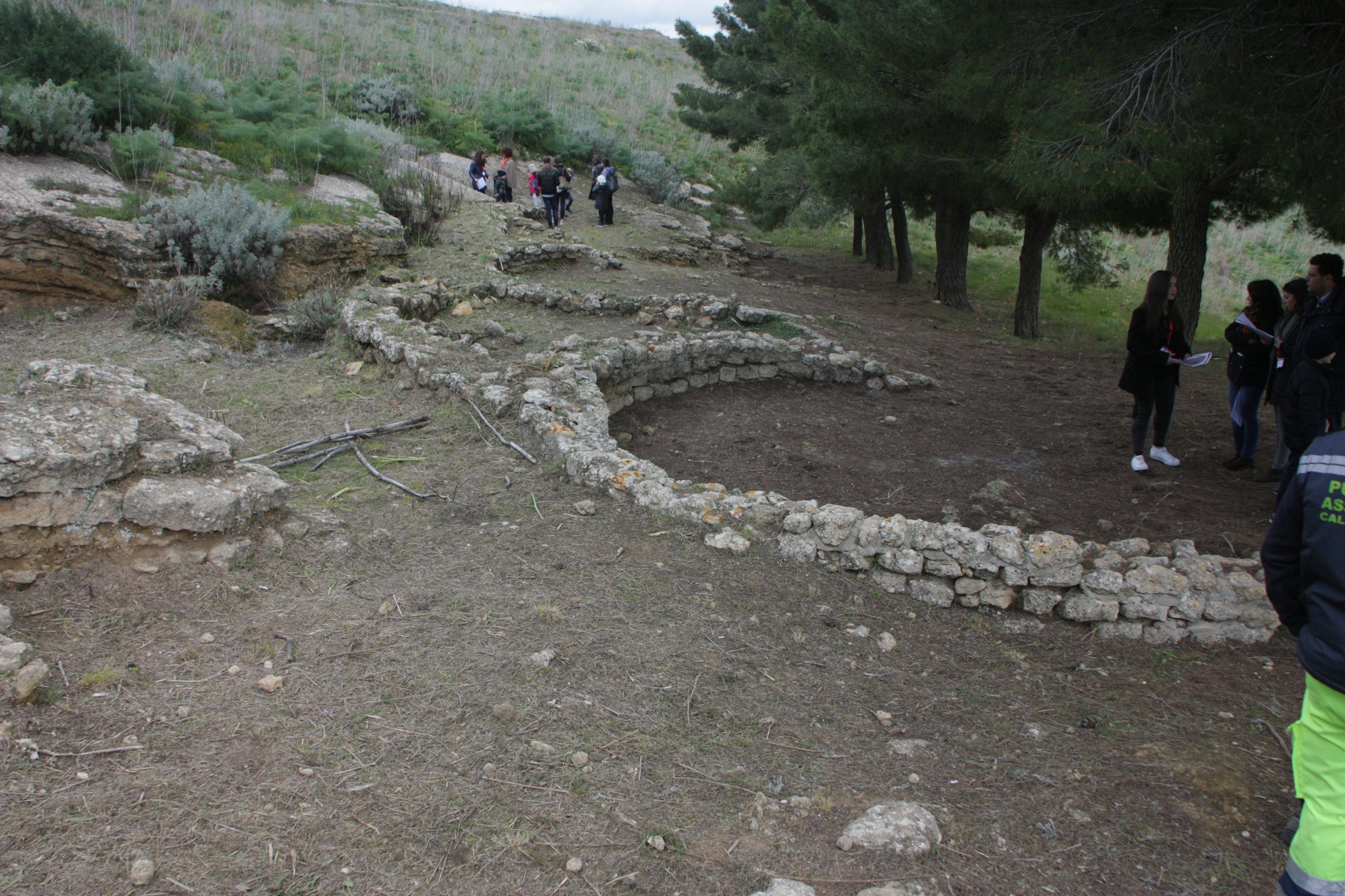 Capanna castellucciana - Sabucina